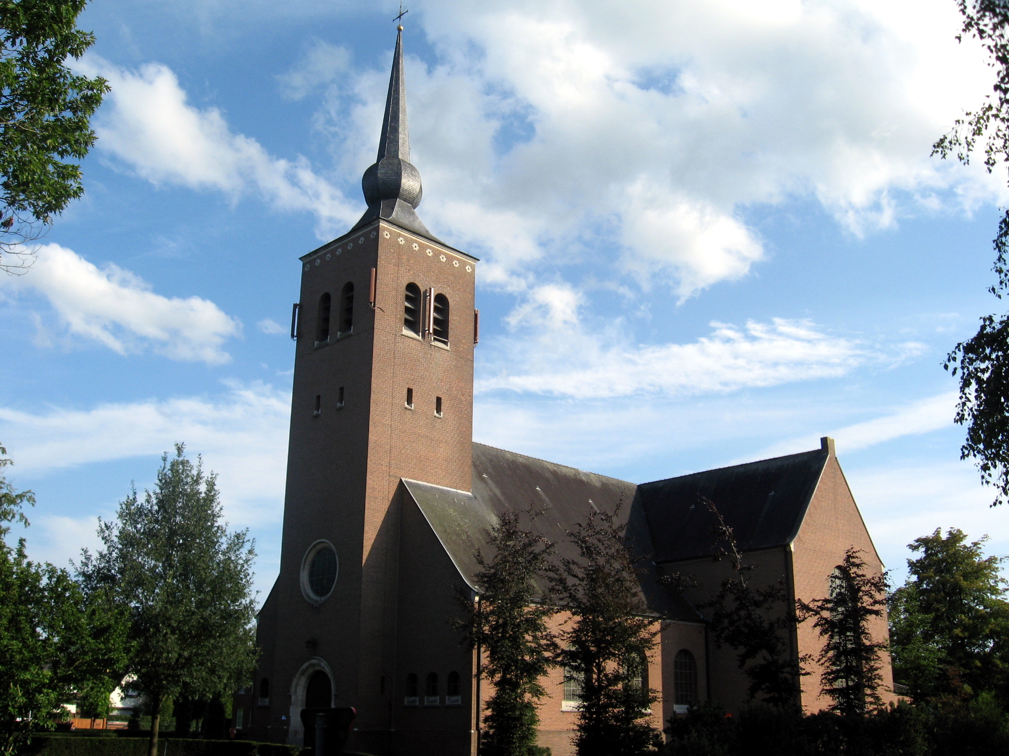 Parochiekerk Onbevlekt Hart van Maria, Koningin van de Wereld, in Zwaneven, Oud-Turnhout